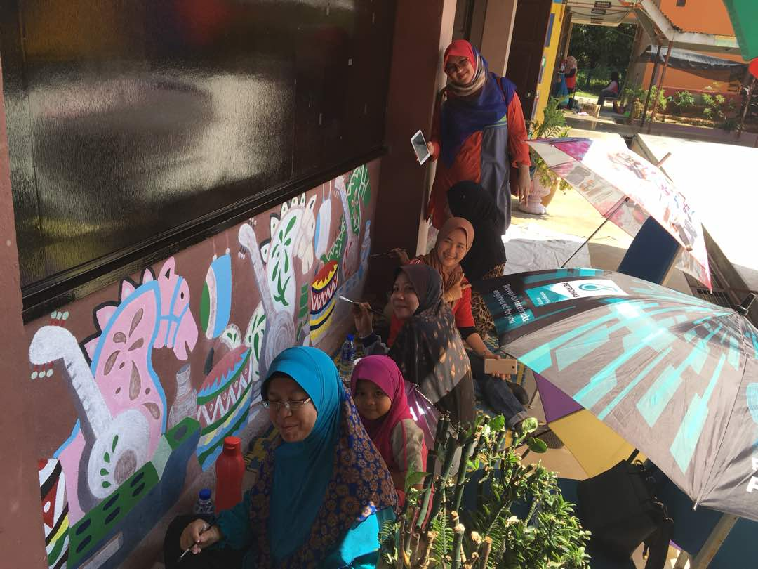 Guru-Guru Wanita Tidak Kurang Hebatnya Dalam Mewarna